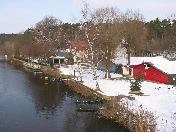 Kohlhasenbrück, Berlin-Wannsee, Blick von der „Böckmann-Brücke“, Teltowkanal